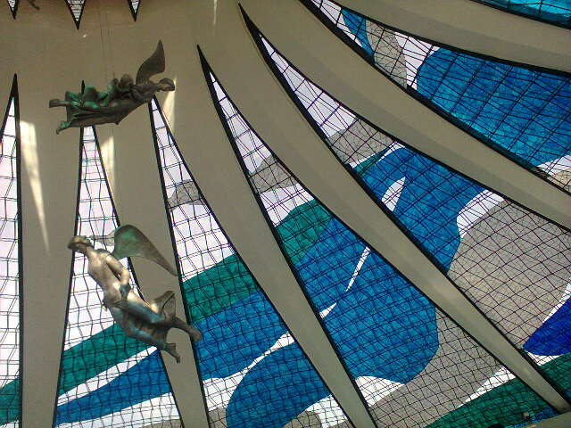 Detalhe dos vitrais de Marianne Peretti e de duas das três esculturas Três Anjos de Alfredo Ceschiatti e Dante Croce, na igreja projetada por Oscar Niemeyer